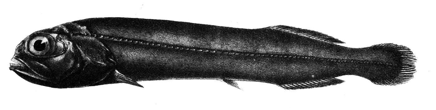 Rouleina squamilatera